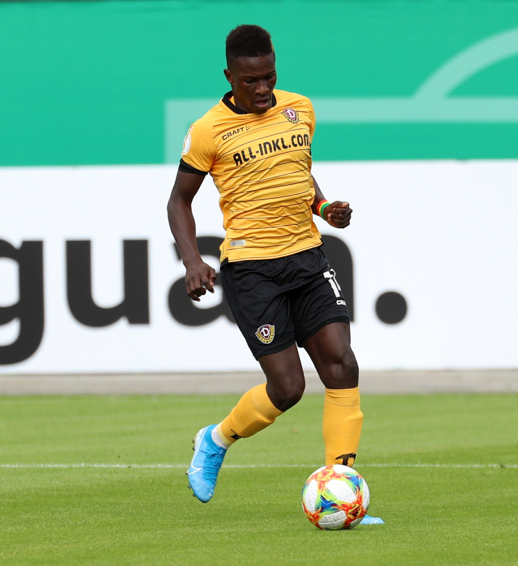 DFB-Pokal 2019/20, 1. Hauptrunde, TuS Dassendorf gegen SG Dynamo Dresden 0:3 (0:1)